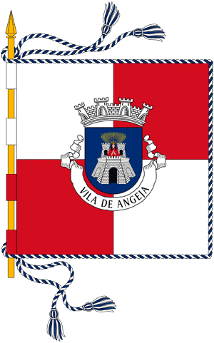 Bandeira da Freguesia de Angeja